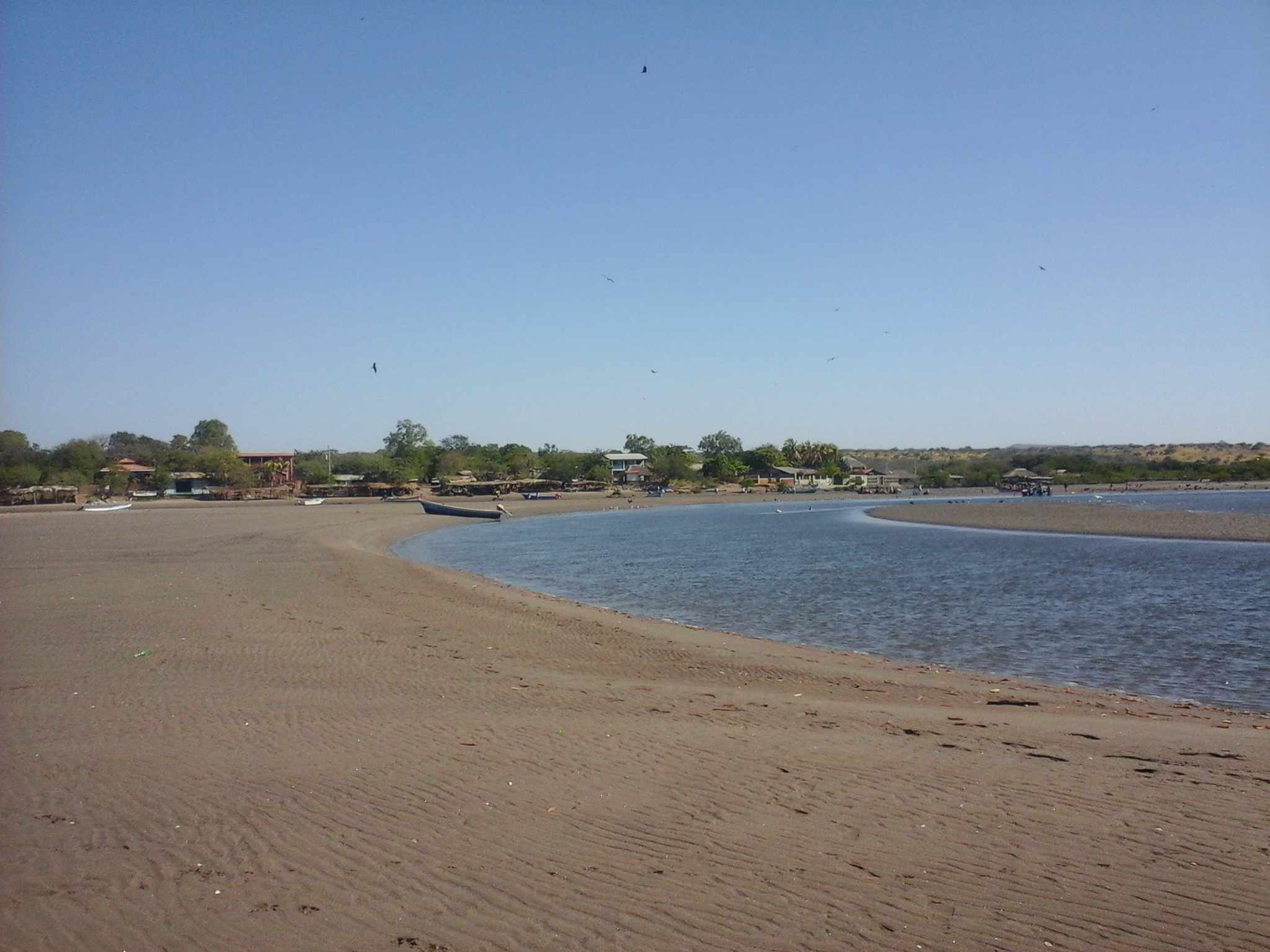 Las Peñitas, Nicaragua